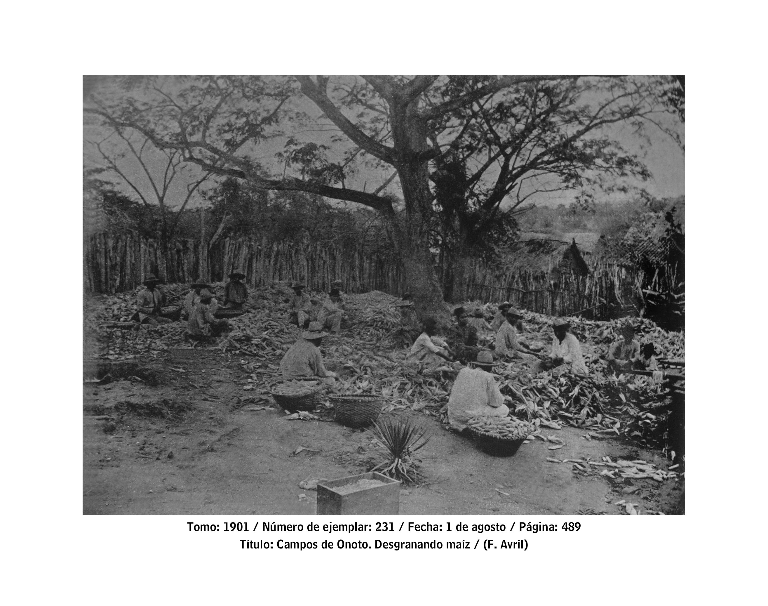 Campos de onoto, desgranando maíz.